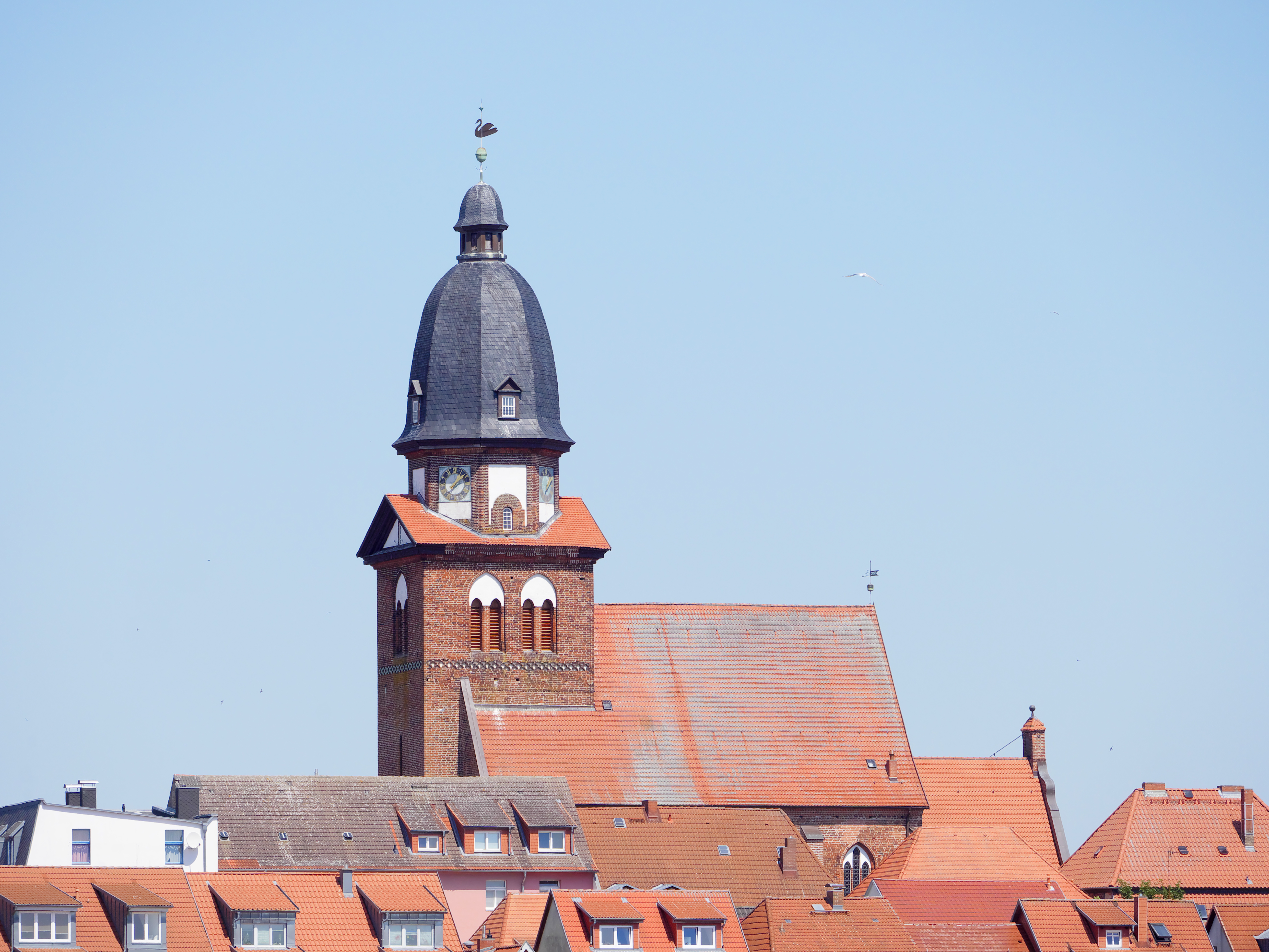 Sankt-Marien-Kirche in Waren an der Müritz (Deutschland) von der Müritz aus gesehen.